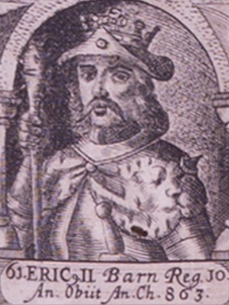 Mindre udsnit forestillende den danske konge Horik II eller Erik II Barn fra "Veræ effigies regum omnium qvi a primo Dan usqe Christianum IV modo regnantem imperii Danici gloria eminuerunt" udgivet i 1670 af Erico Olai Tormio. Horik II blev konge i 854 og var dansk konge indtil engang i 860'erne eller tidligt i 870'erne.